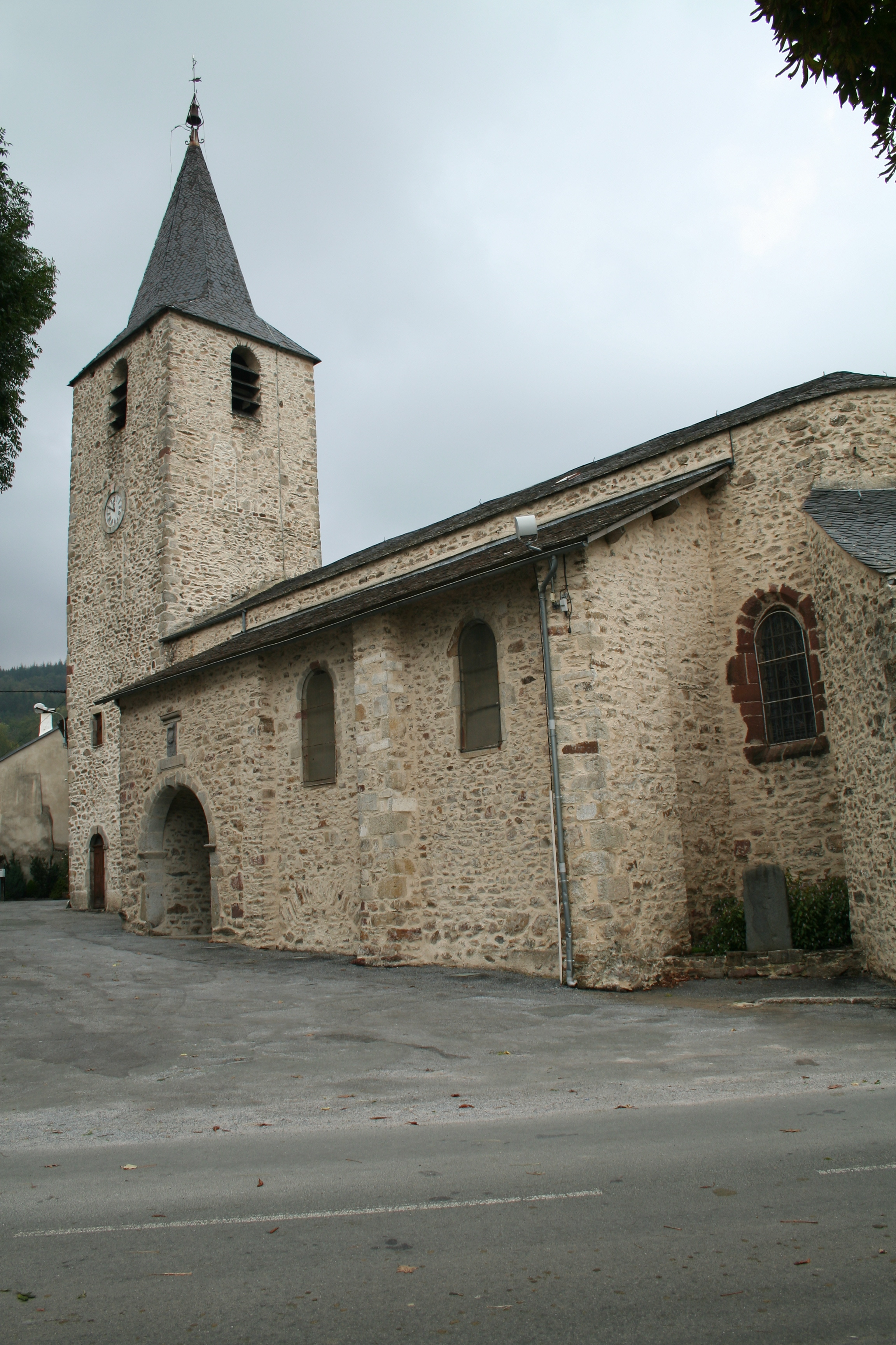 Église paroissiale Saint-Victor de Nages (Tarn)